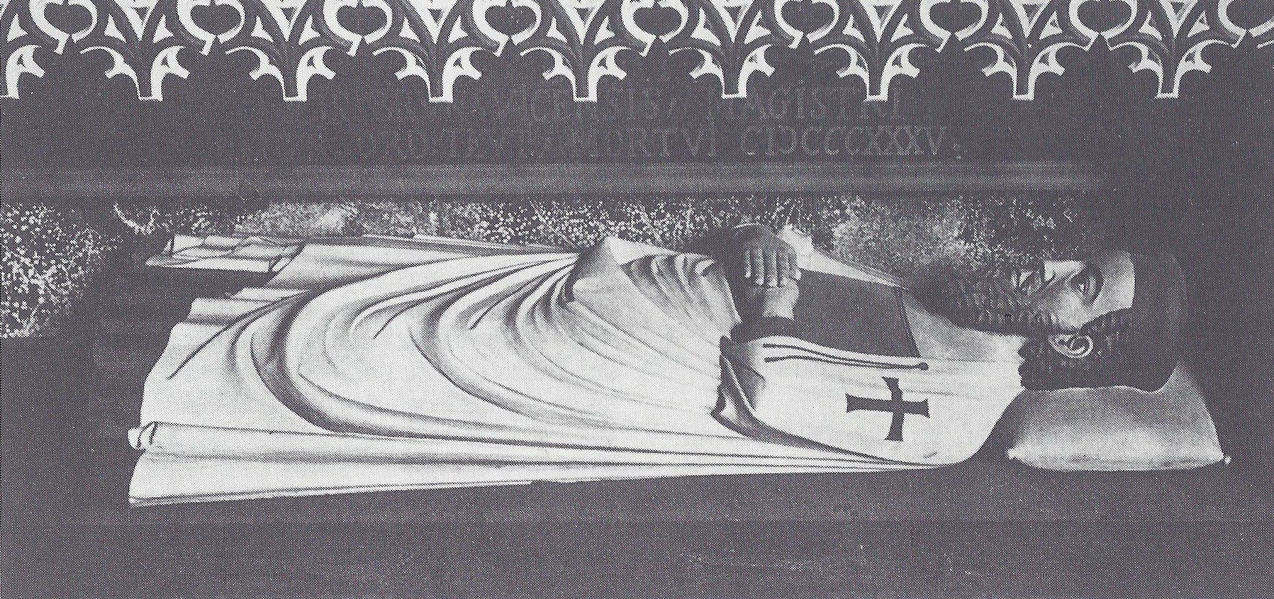 Liegende Holzfigur des Hochmeisters Luther von Braunschweig im Königsberger Dom